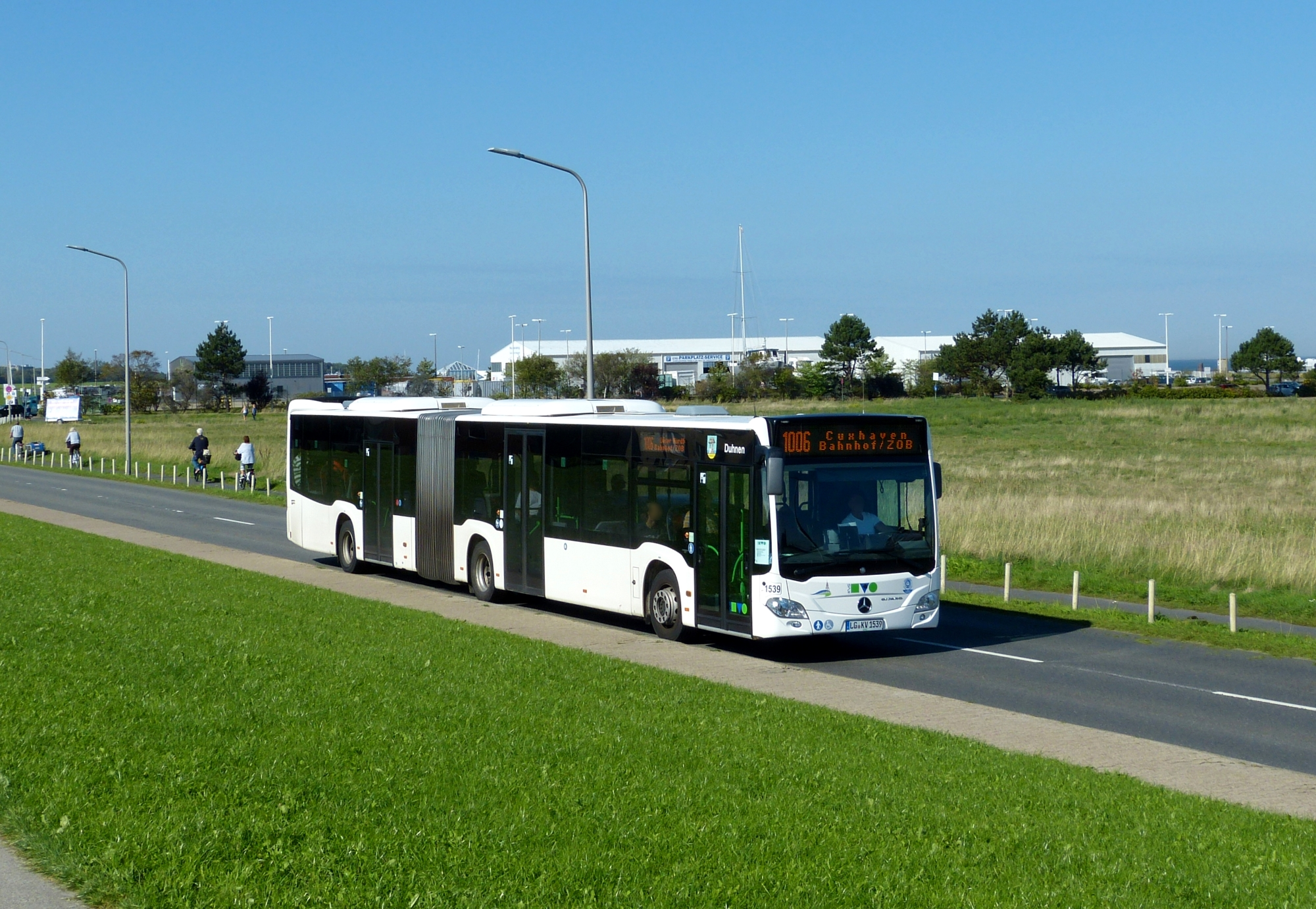 Wagen 1539 der KVG Stade, ein Citaro G, in der Cassen-Eils-Straße in Cuxhaven